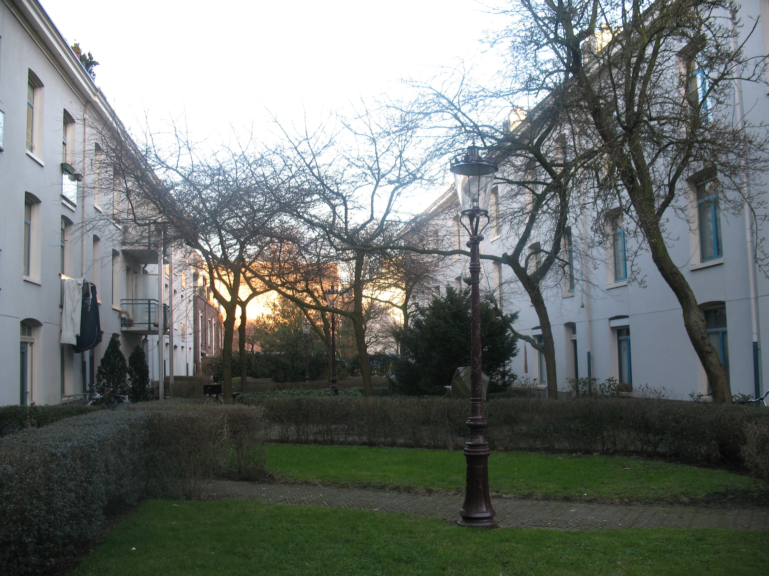 Binnenhof Concordia-noord, Jordaan-noord, Amsterdam